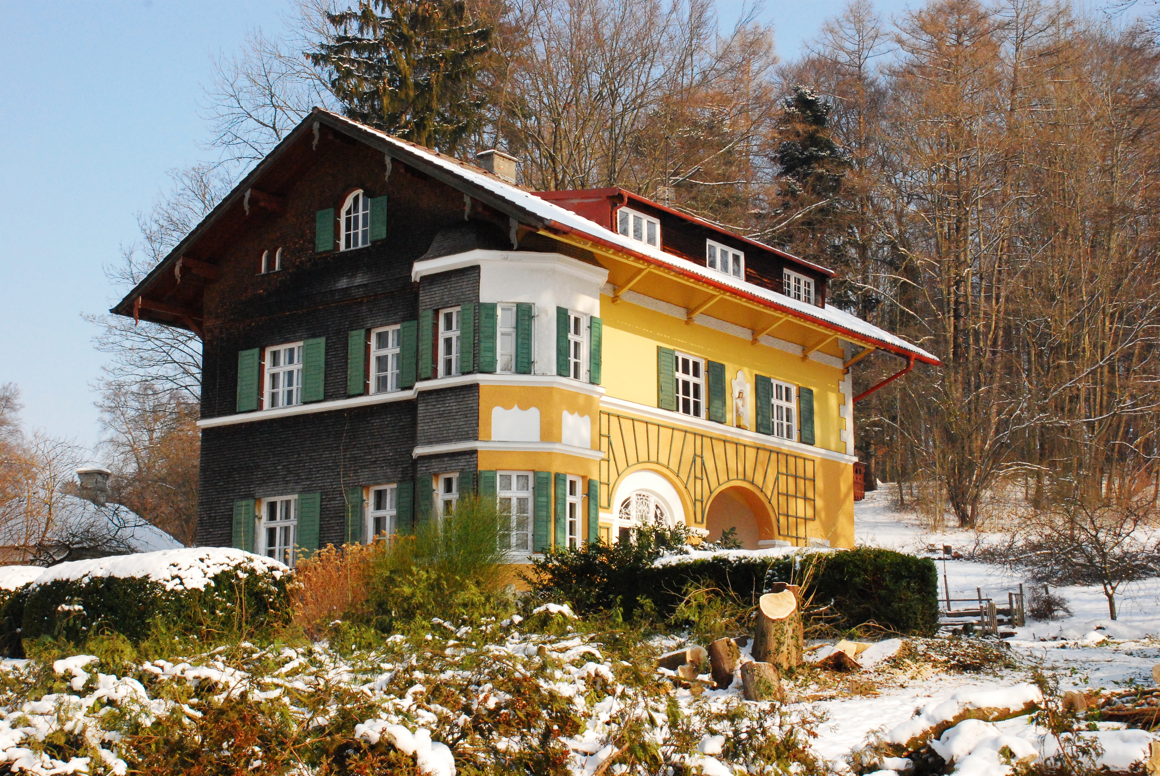 Landhaus an der Seeuferstraße 3 in Ambach, Gemeinde Münsing, Landkreis Bad Tölz-Wolfratshausen, Regierungsbezirk Oberbayern, Bayern. Als Baudenkmal in der Bayerischen Denkmalliste aufgeführt. Laut Denkmalliste erbaut 1893.